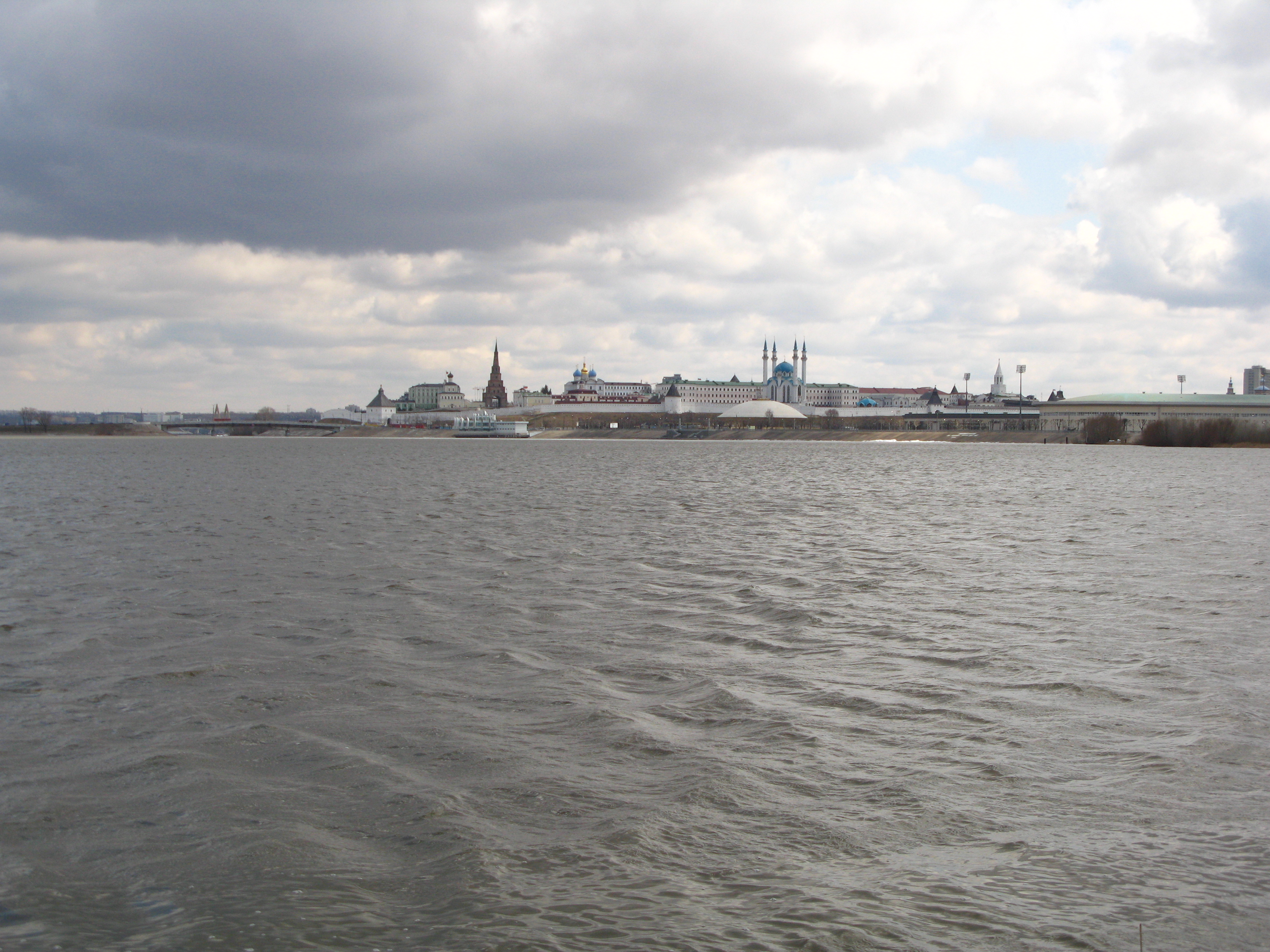 Казањ са реке Казањке.